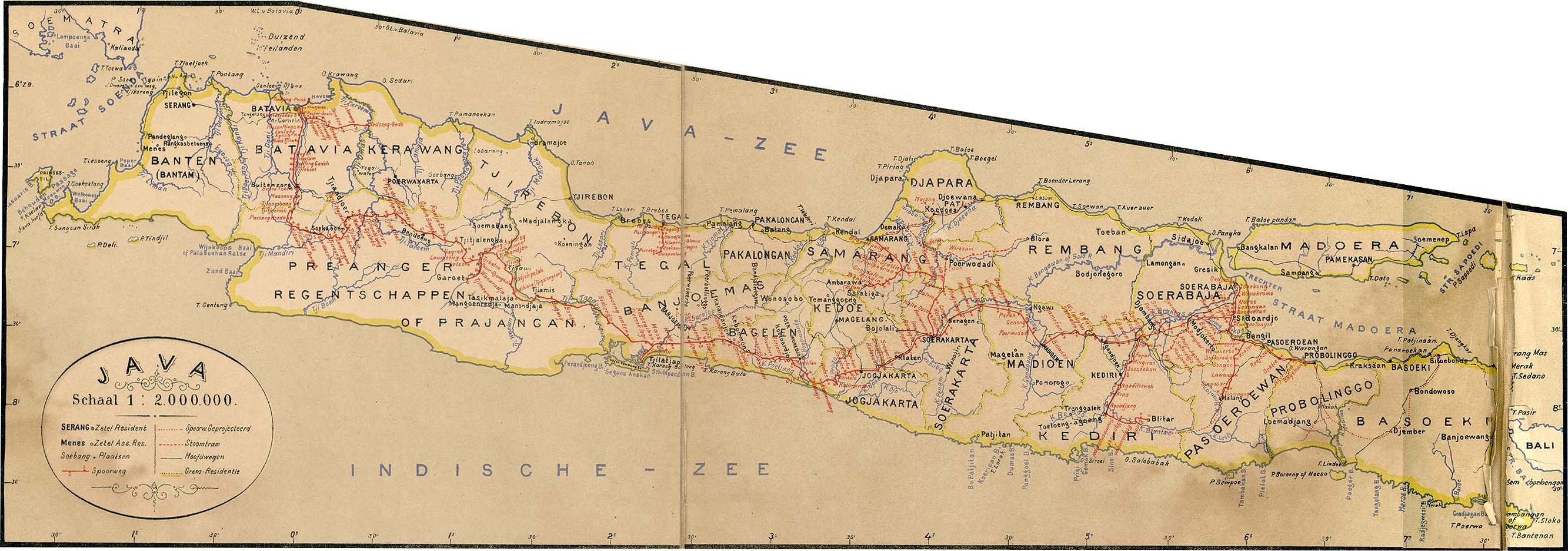 ""Kaart van Nederlandisch-Indie naar oorspronkelijke teekening van H. Ph. Th. Witkamp", J.H. deBussy, Amsterdam, ca. 1893." - van